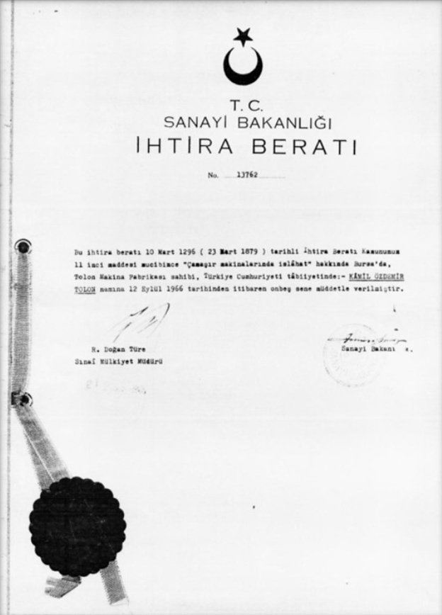 Tolon Çamaşır Makinesi Patenti